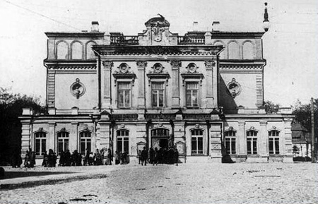 Беларуская (тарашкевіца): Менск (Miensk). Мескі, цяпер Купалаўскі тэатар (Kupałaŭski).